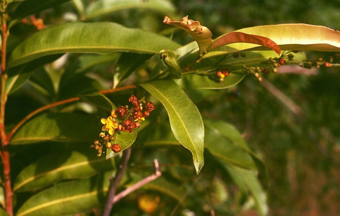 Campylospermum serratum, Ochnaceae - Kambodscha/Cambodia, bei den Stromschnellen (rapids) des Flusses Tek Chhou N Kampot (Prov. Kampot)